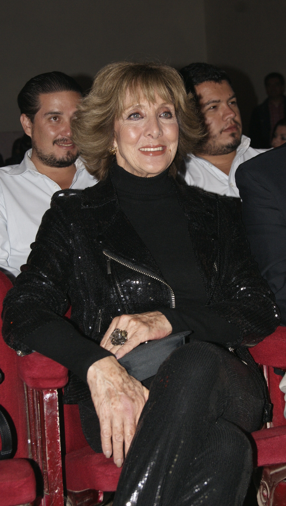 Octubre 18, 2012. Tlalpujahua, Michoacán, México. Homenaje a la Reina del Cine Fantástico. Feratum Film Festival 2012